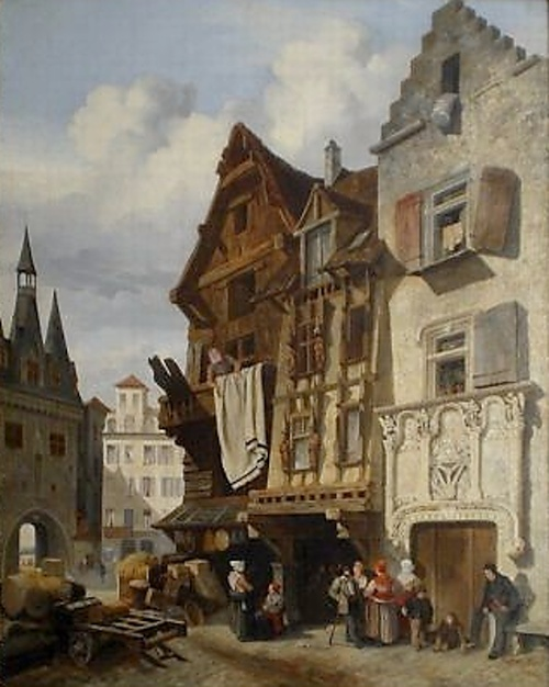 Jean-Marie-Oscar Gué - Porte Cailhau 1833